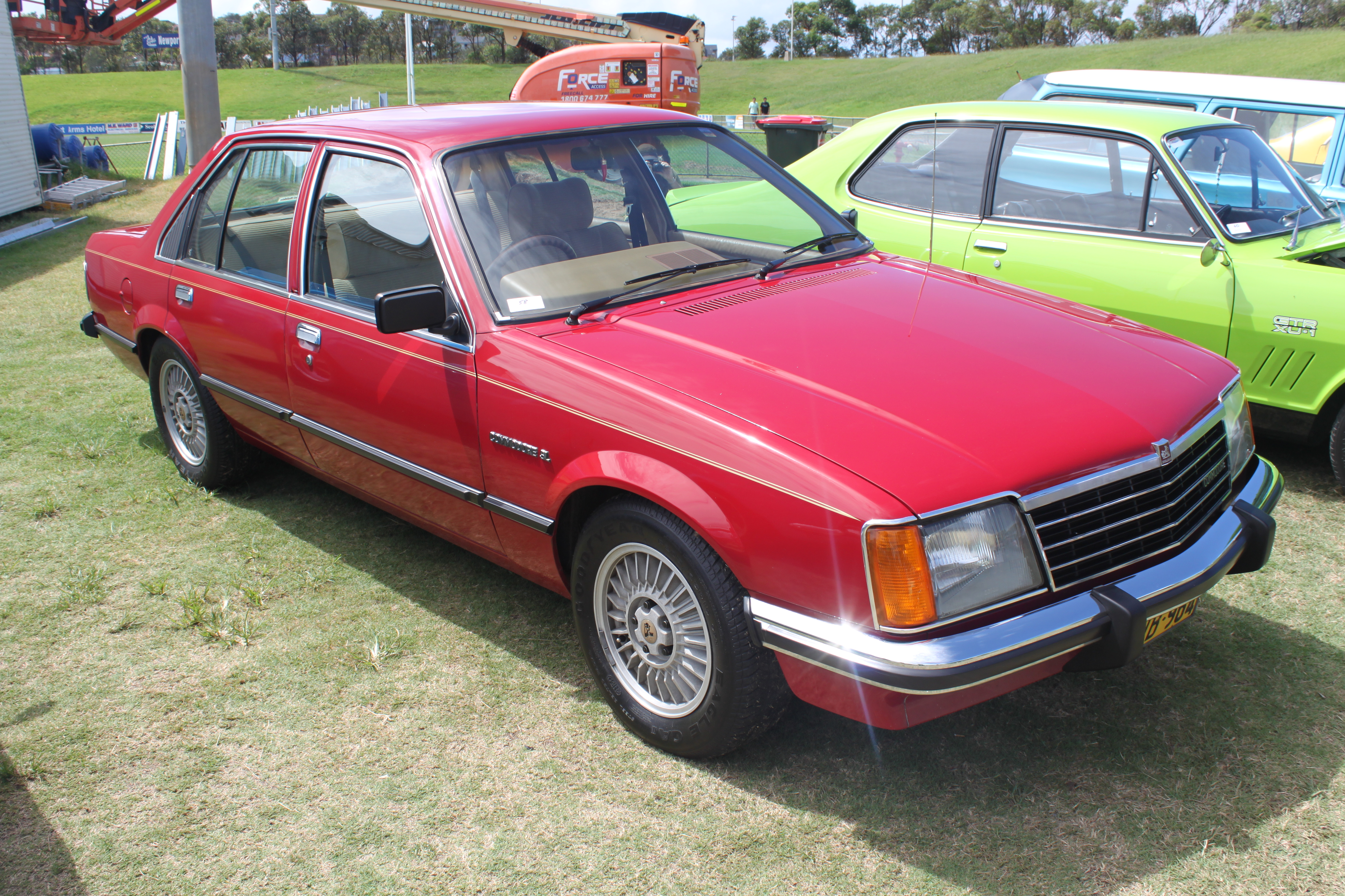 Car & Bike Fest, Pittwater Rugby Park 2015